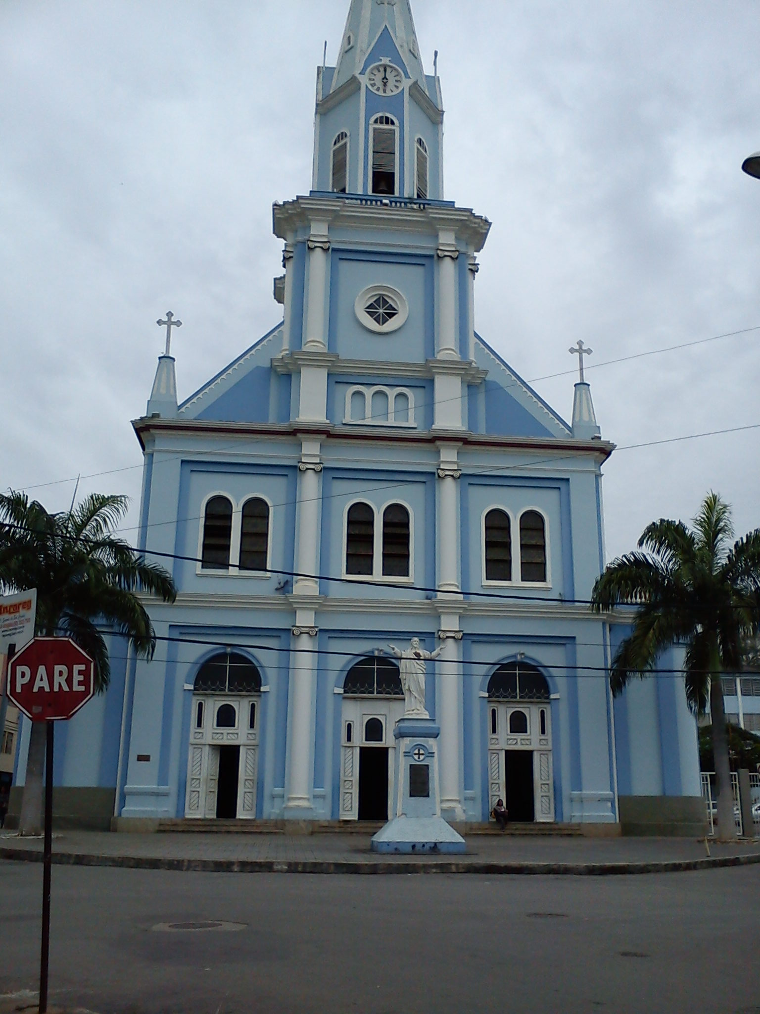 matriz